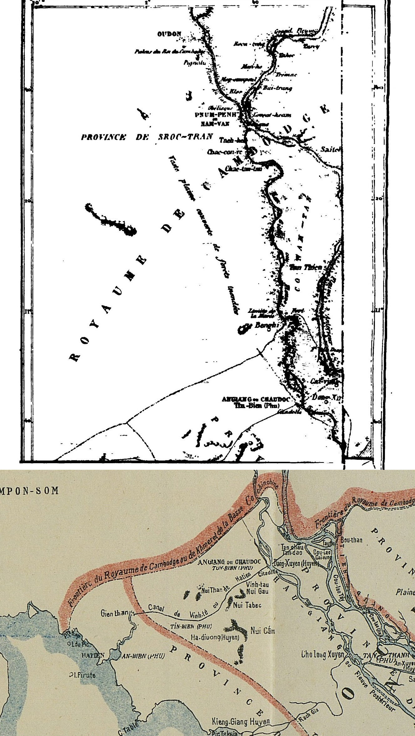 Bản đồ phủ Tuy Biên (Tĩnh Biên) tỉnh An Gang nước Đại Nam năm 1861 và một phần lãnh thổ vương quốc Cao Miên.